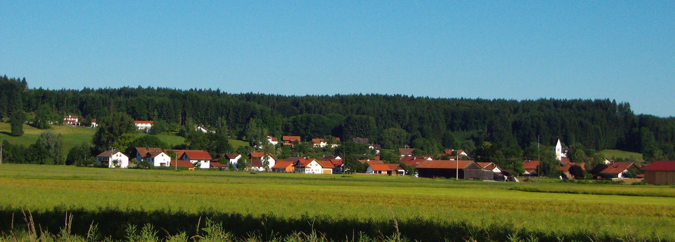 Oberdiessen